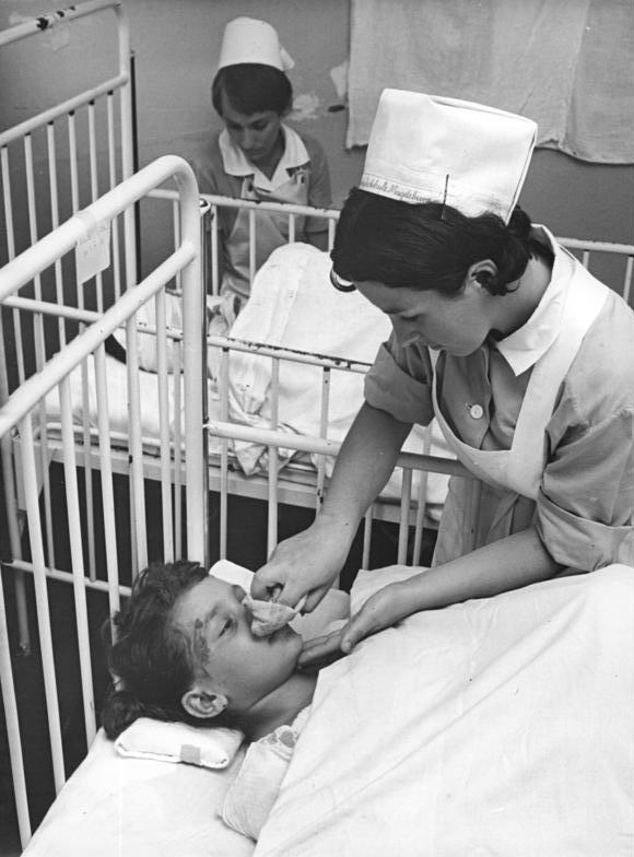 Zentralbild Reiche 8.7.1967 Magdeburg: Jede erdenkliche Hilfe für Verletzte des Verkehrsunglückes von Langenweddingen Liebevoll wird die 10-jährige Sylvia Achilles aus Magdeburg von Schwester Hannelore im Kinderkrankenhaus Magdeburg betreut.